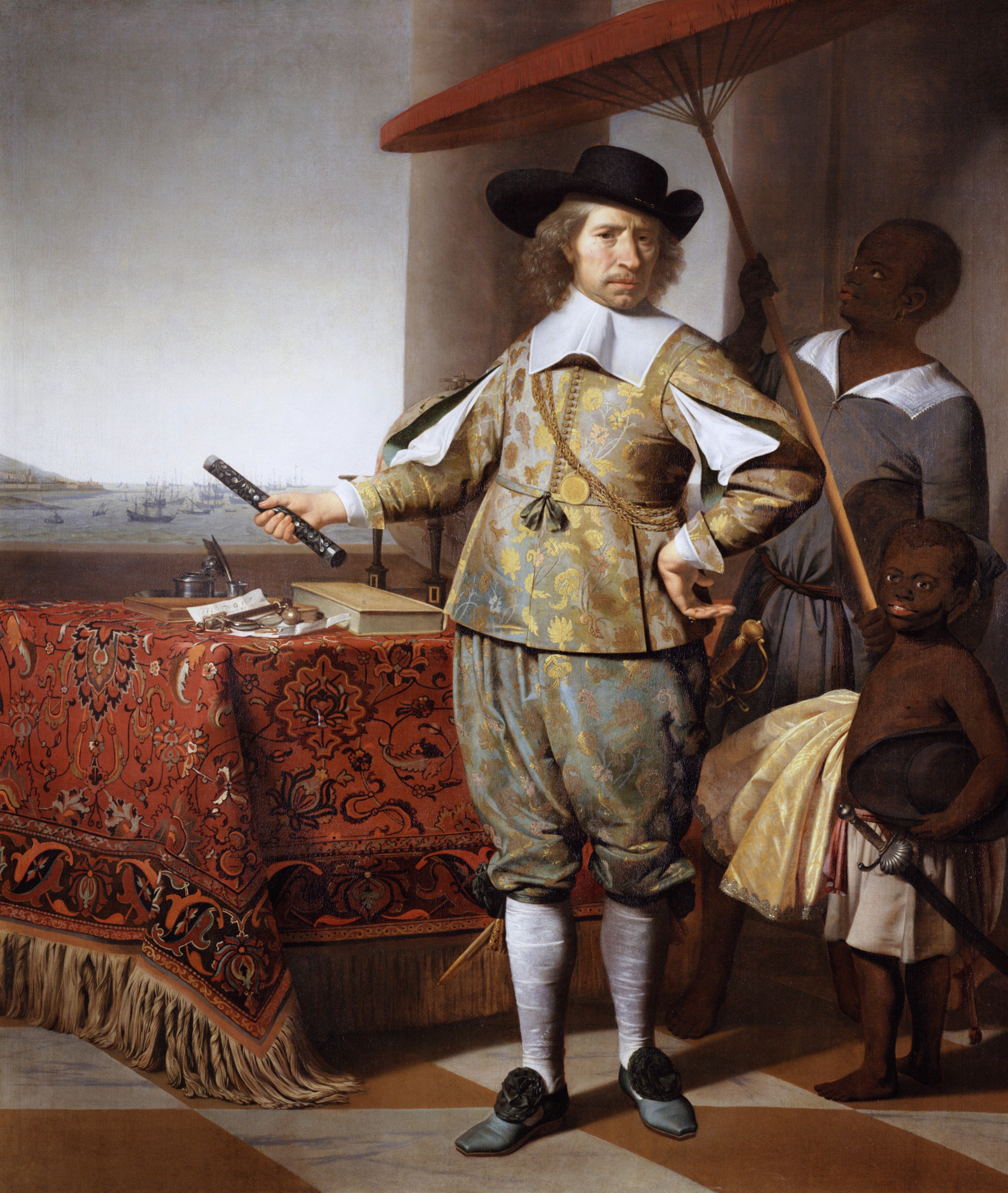 Schilderij, titel: "Wollebrand Geleynssen de Jongh voor de retourvloot van 1648"